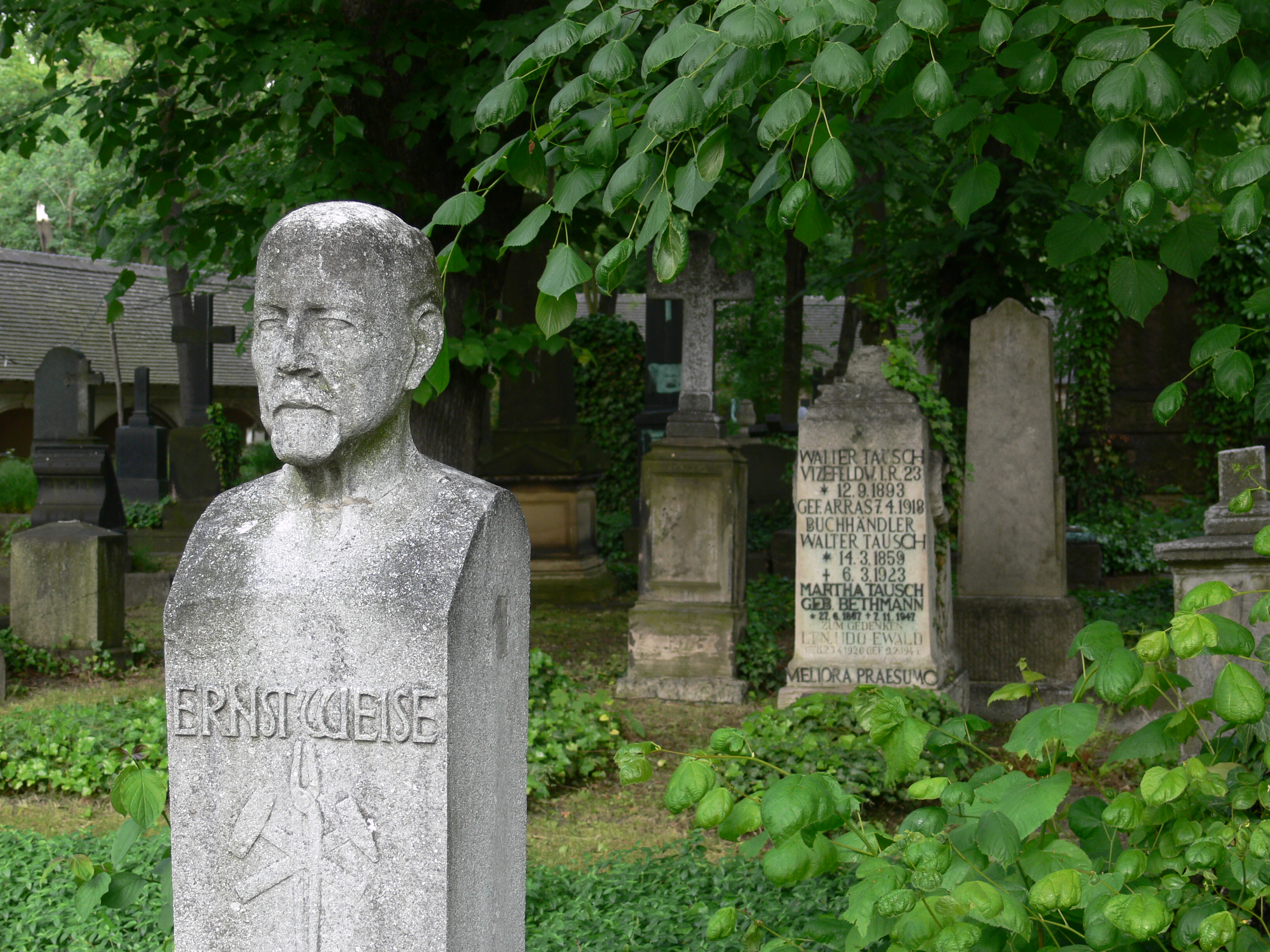 Stadtgottesacker, Halle an der Saale, Grabdenkmal für Rudolf Ernst Weise (1844-1935)